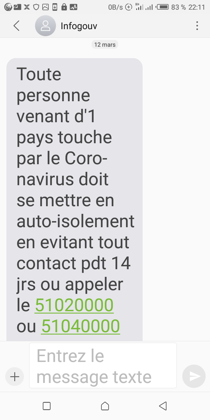 Message d'alerte contre le COVID-19 au Bénin pour signaler toute personne venant de l’étranger